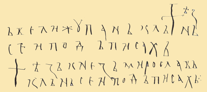 Потписи великог жупана Стефана Немање и његовог брата кнеза Мирослава на уговору којим је, након освајања Зете,26 септембра 1186. године склопљен мир са Дубровником (Историјски архив, Дубровник).